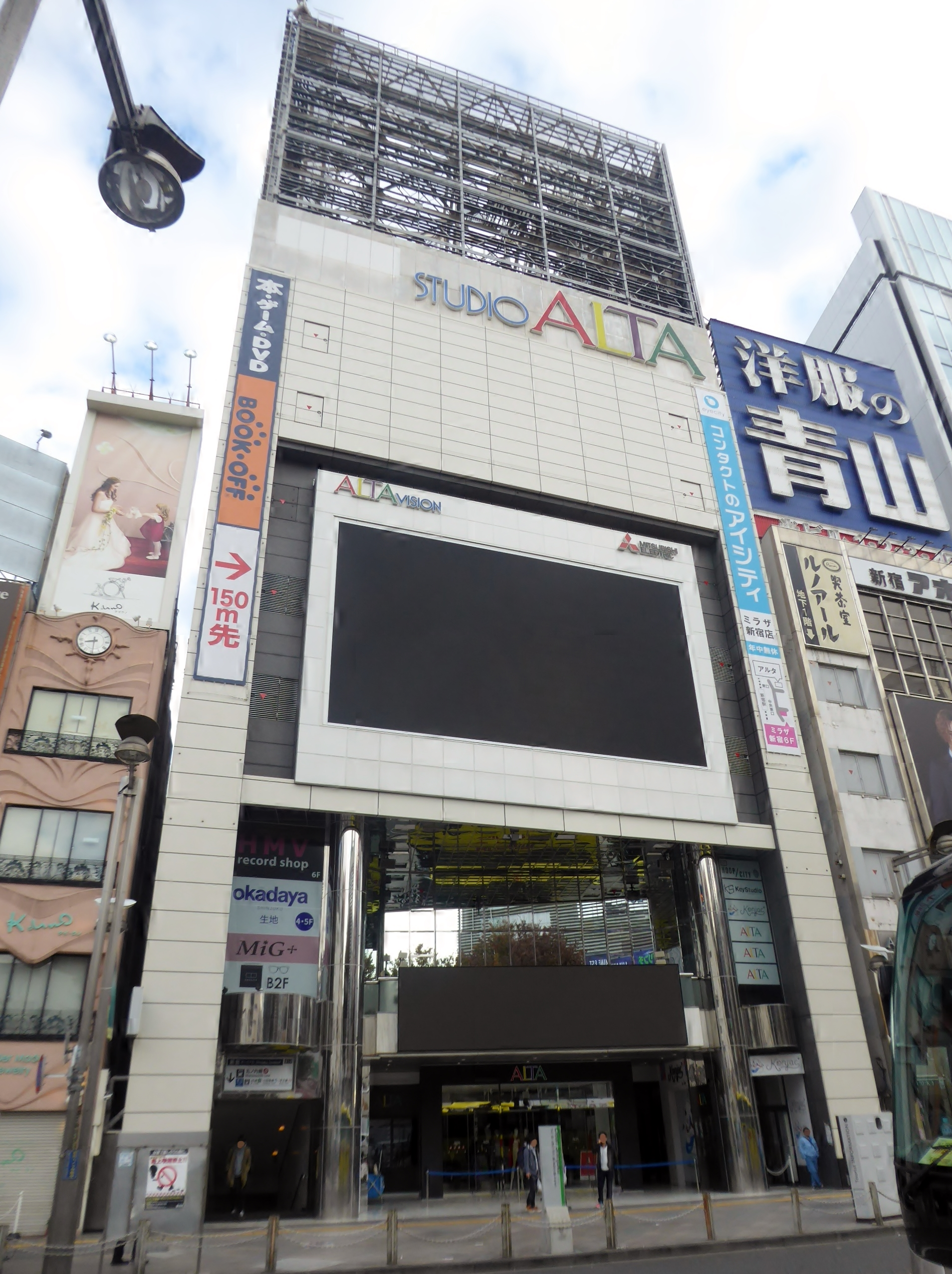 2018年11月24日時点のスタジオアルタを撮影。